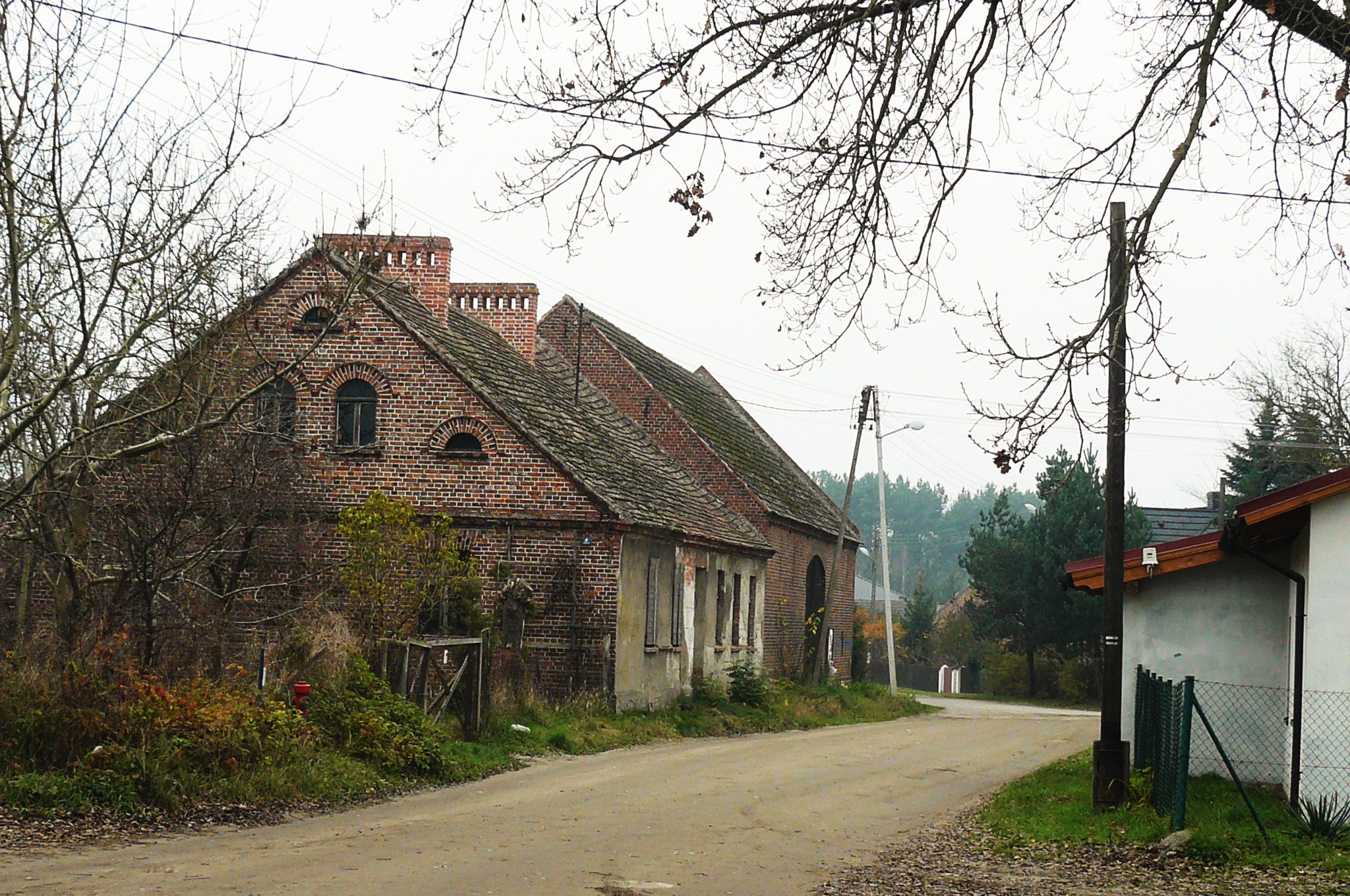 Radgoszcz w Puszczy Noteckiej.